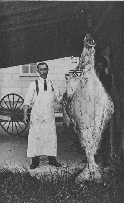 Île d'Anticosti - grand flétan